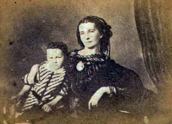 Portret van Carolina Hortensia Victoire Regout-Bonhomme (1831-1861) en een van haar zoons, waarschijnlijk William Victor Hubert Antoine Regout (1855-1881). Carolina stierf nog geen 30 jaar oud; haar zoon verdronk op 26-jarige leeftijd bij Sint Pieter. Foto in: Album de la famille de Mr. Pierre Regout à Maestricht. Vervaardigd door: Billon, Photographe, Neveu et Élève de Mr. Daguerre, rue des Recollets, 13, Paris. Bevat foto’s van diverse leden van de familie Regout en van de prenten uit het Album dédie à mes enfants et mes amis. Fotocollectie RHCL Maastricht, RAL P-0656-099.